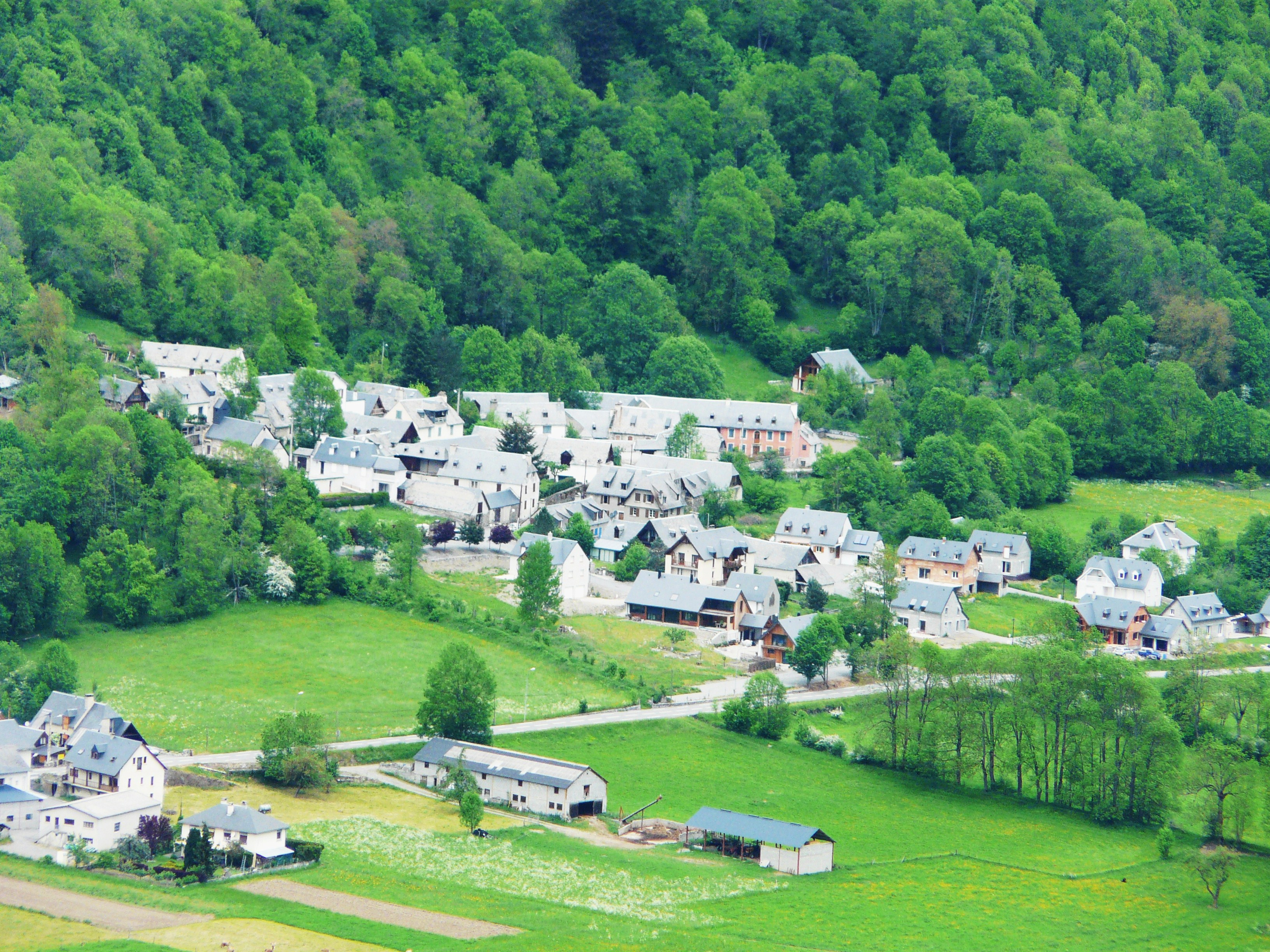 Le village de Pouchergues, Adervielle-Pouchergues, Hautes-Pyrénées, France. Vue prise depuis le village de Loudervielle.